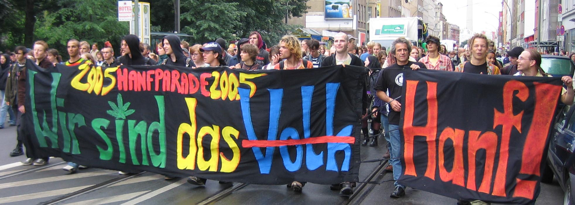 Leittransparent der Hanfparade2005, Berlin, Rosenthaler Straße